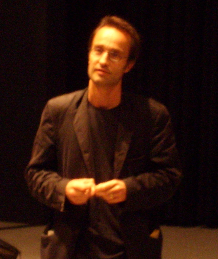 Emmanuel Bourdieu pour la présentation de son film Intrusion(s), à la Maison de la Culture d'Amiens